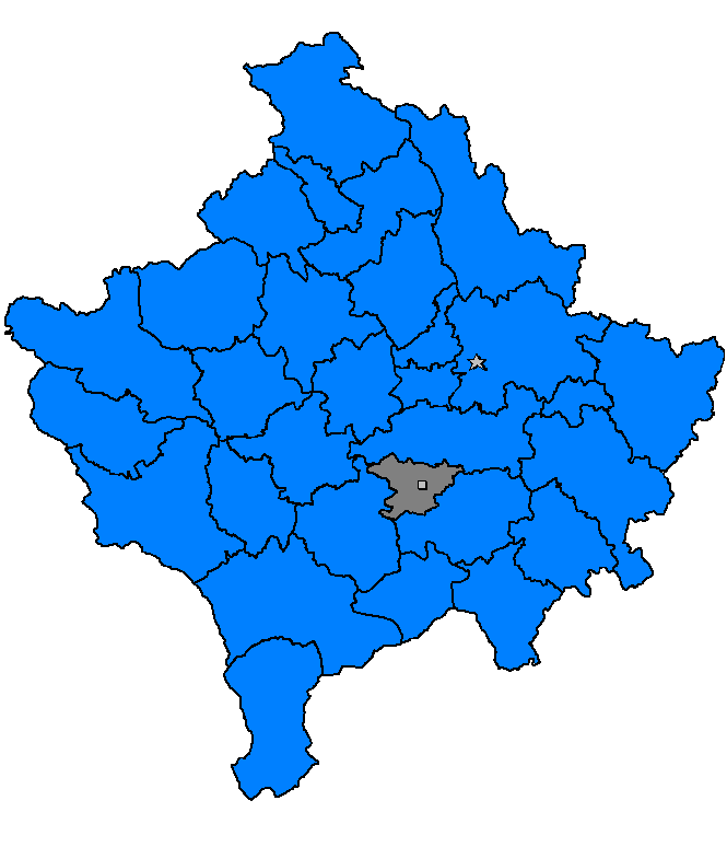 Shtime, Kosovë 2006